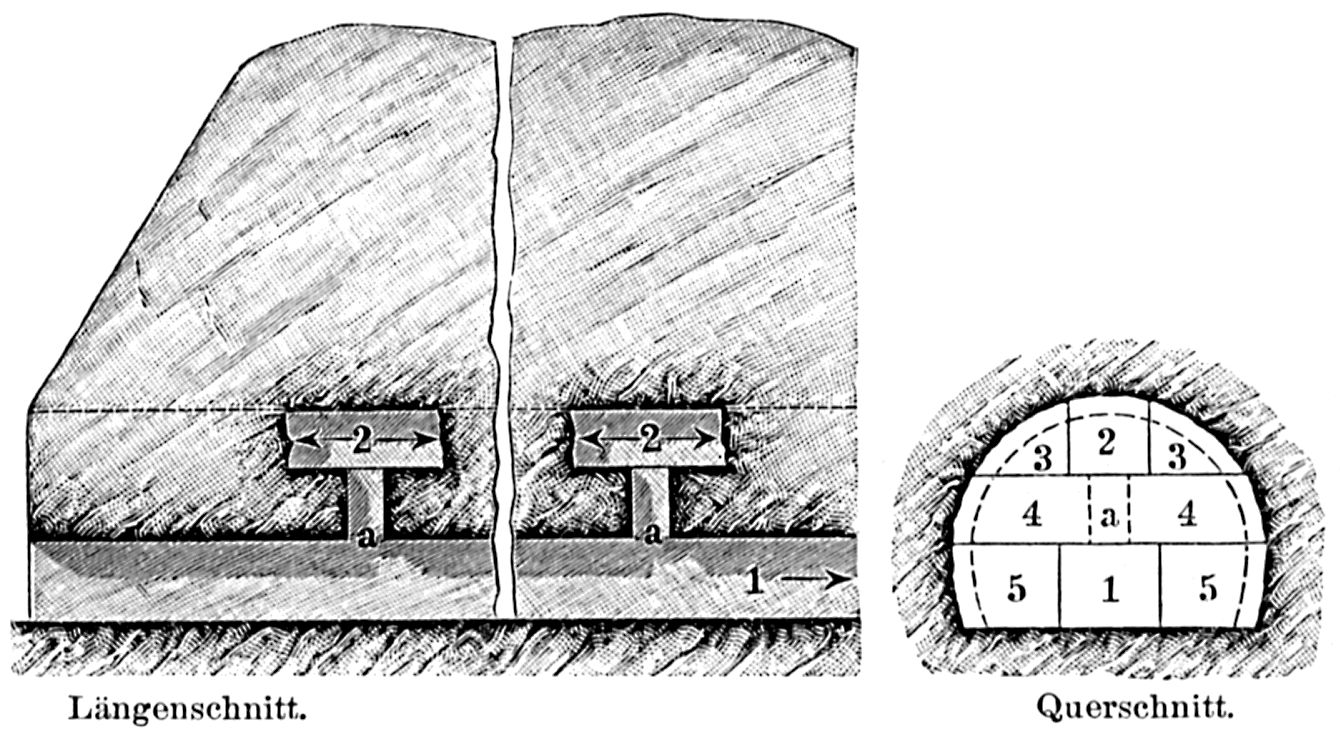 Englische Tunnelbauweise. 1: Sohlenstollen, 2. Firststollen, 3. Ausweitung für den obern Teil der Kappe, 4. Strossen, 5. Aushub für die Widerlager, s. dazu den Artikel Tunnel in Meyers Großem Konversations-Lexikon 1905